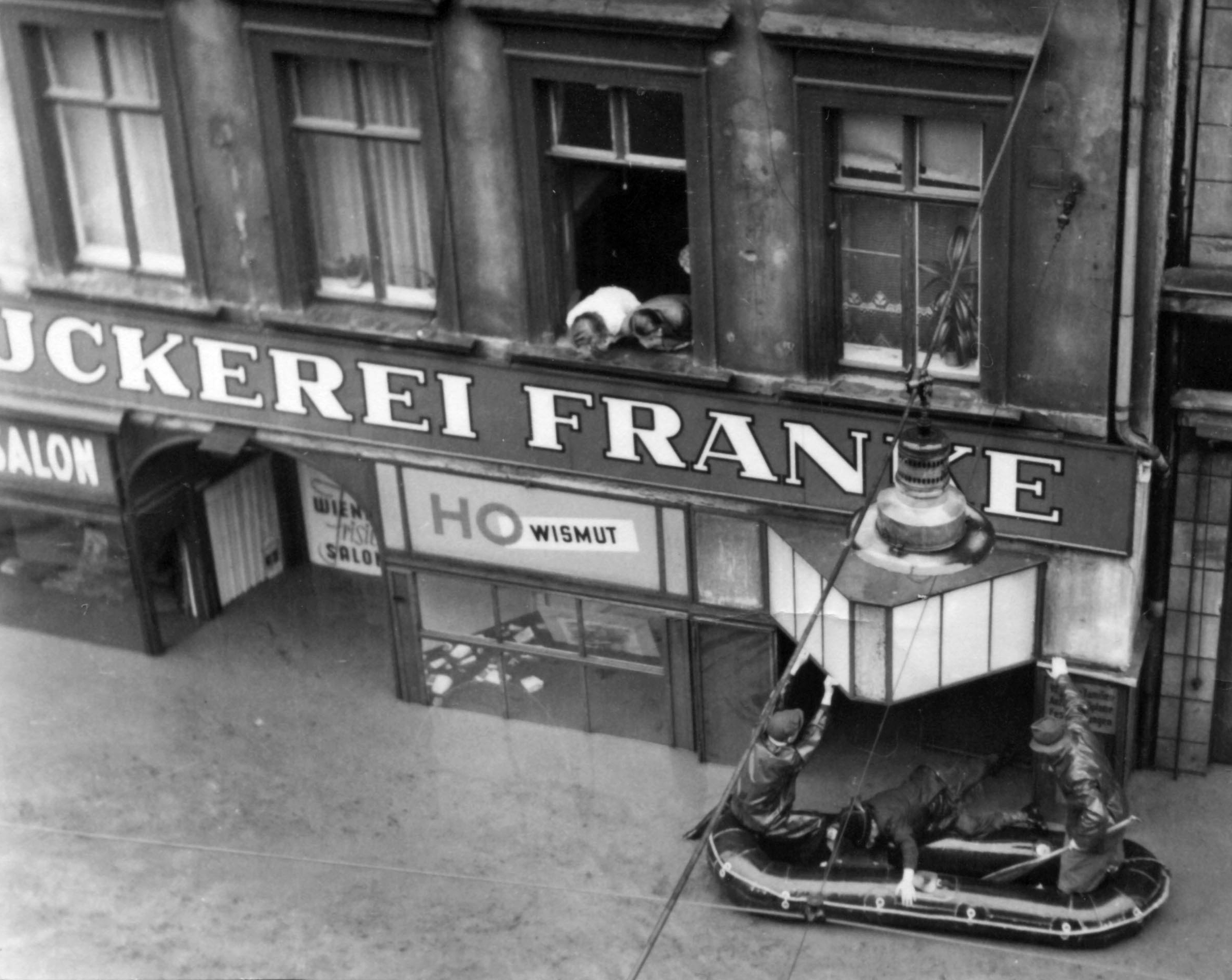 Hochwasser und Überschwemmung am 10. Juli 1954 in der Zwickauer Innenstadt